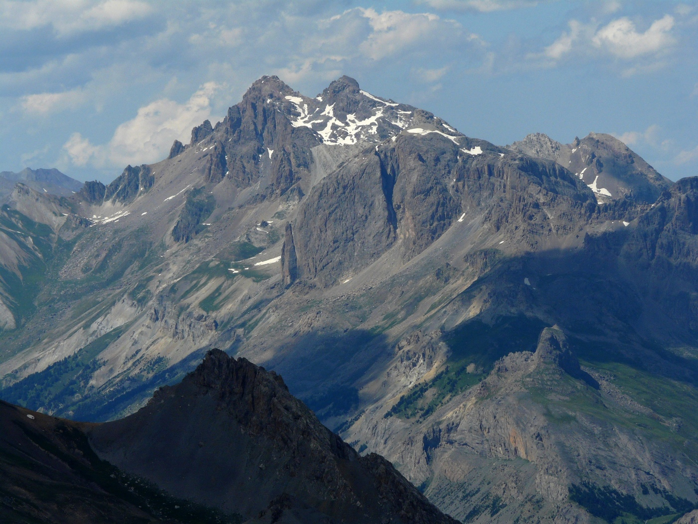 Il Grand Galibier - versante sud. A sinistra la vetta ovest e a destra la vetta est